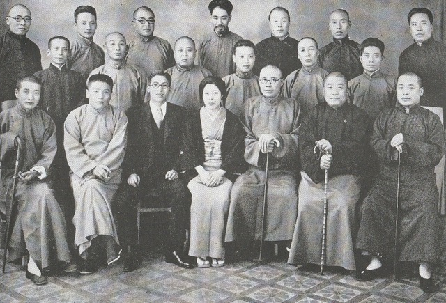 繭山順吉が父の死後、北京に赴いた折に同業者たちから受けた歓待の様子の画像。北京同業者歓迎会昭和１０年。繭山順吉と母みよは前列左から３番目４番目